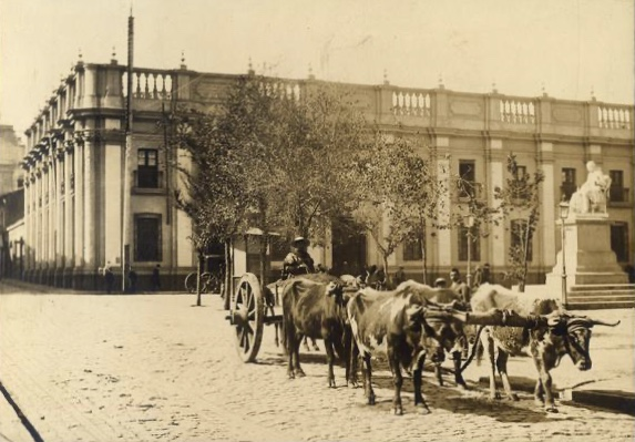 Tribunales de justicia de Santiago de Chile hacia 1900 (Palacio de los Tribunales Viejos)